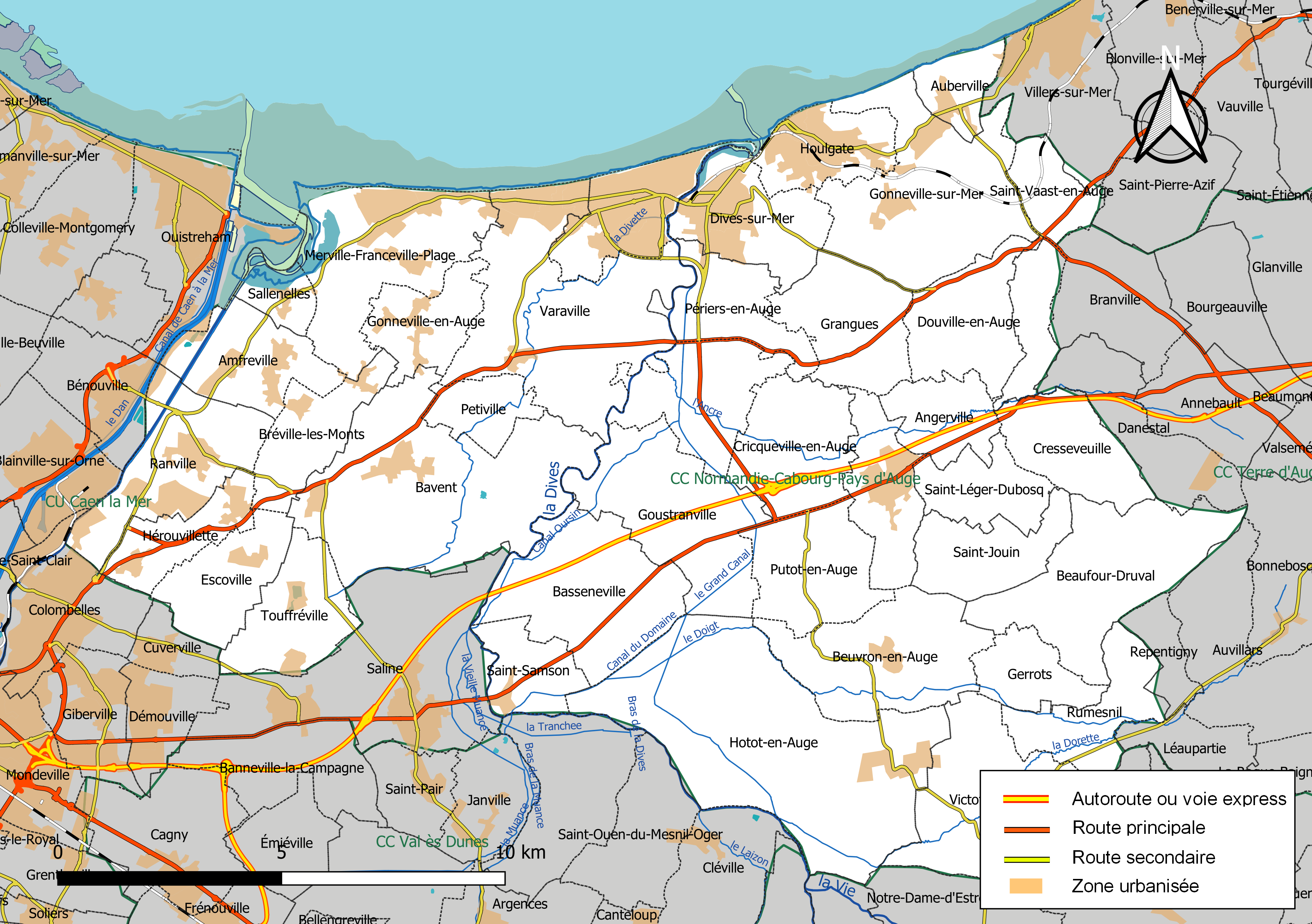 Carte géographique de la Communauté de communes Normandie-Cabourg-Pays d'Auge, département du Calvados, France. Composition au 1er janvier 2019.